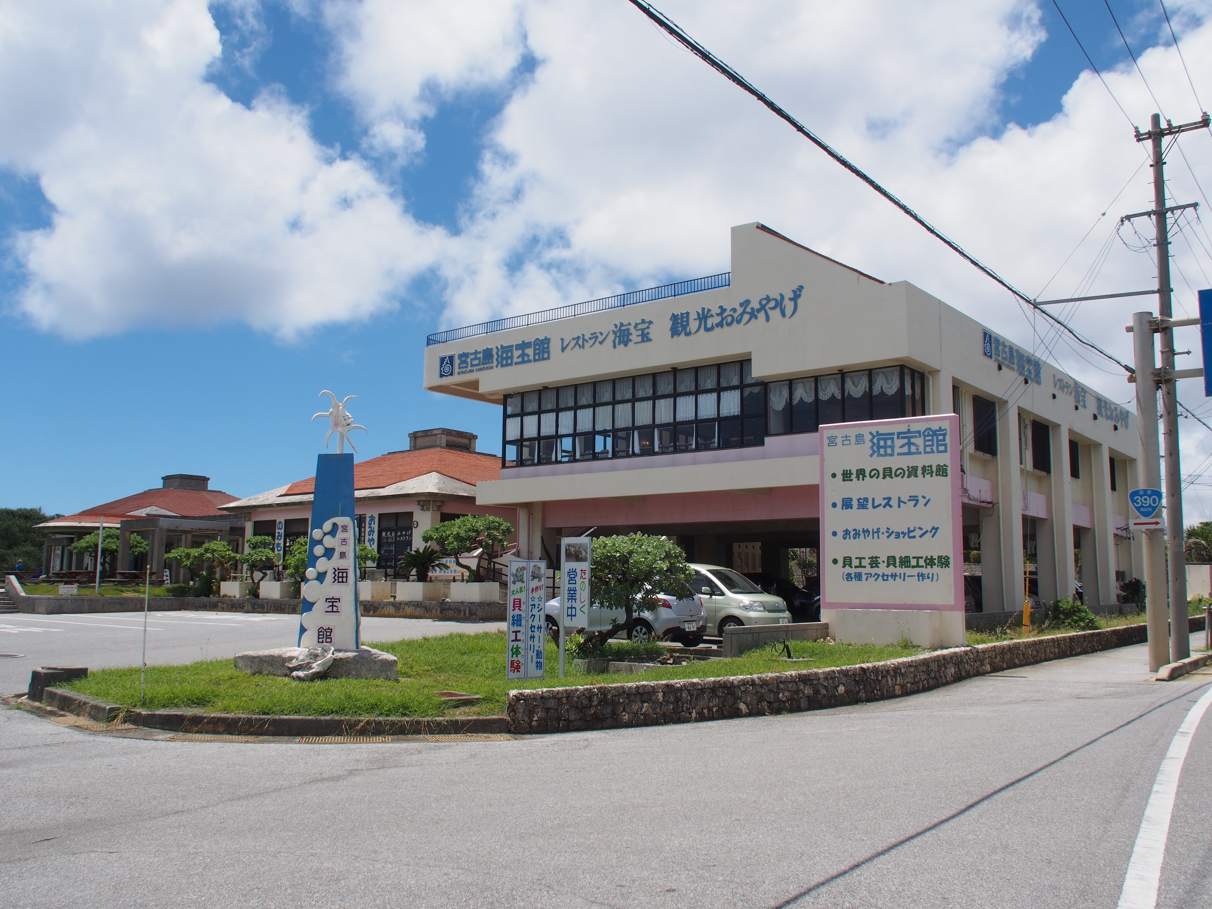 宮古島海宝館（沖縄県宮古島市宮古島）